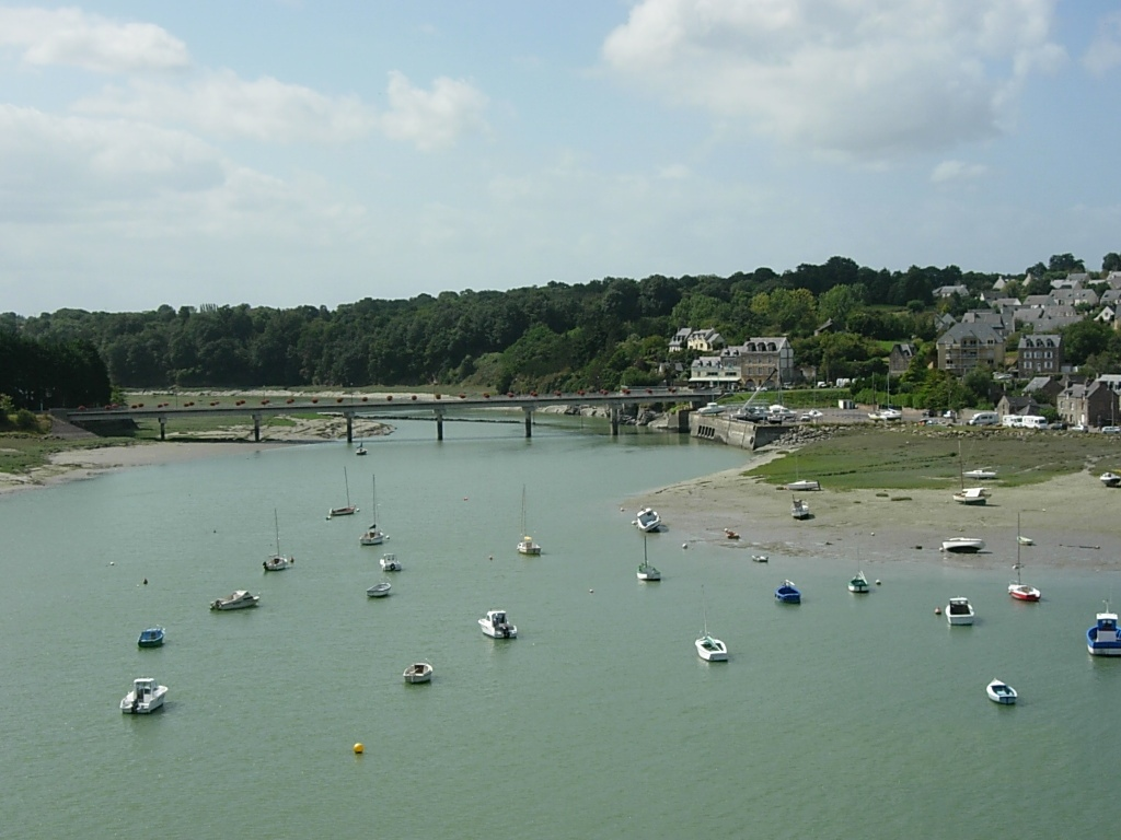 Photographie de la rivière Arguenon sur la commune de Créhen